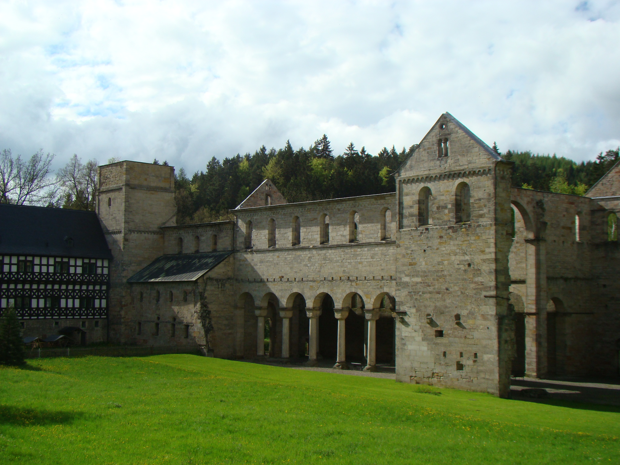 Kloster Paulinzella